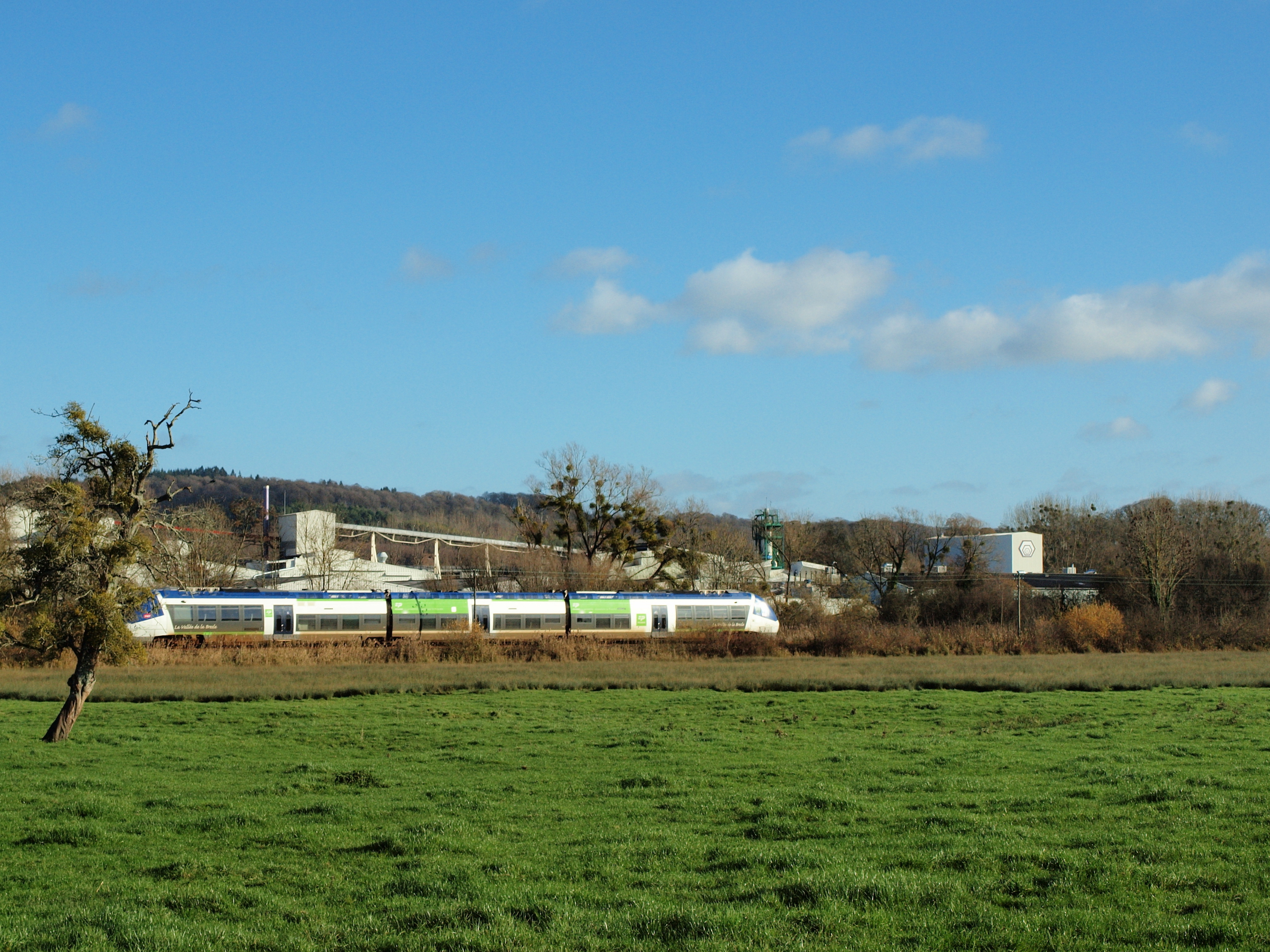 Verrerie du Courval, Guimerville (Seine Maritime, France)